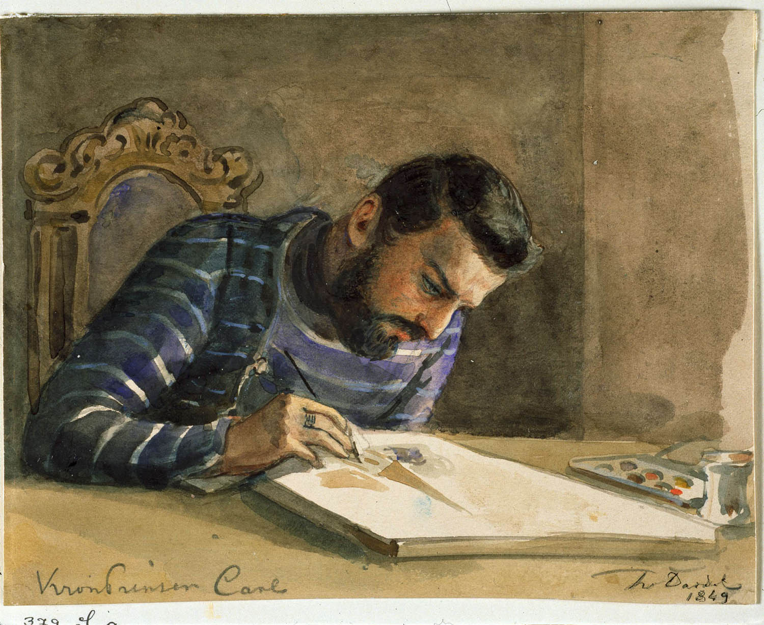 Depicted person: Karl XV, Kung av Sverige och Norge 1859-1872, Sverige (1826-05-03-1872-09-18); Karl IV (namn som kung av Norge); Carl IV (alternativ stavning); Carl XV (alternativ stavning)